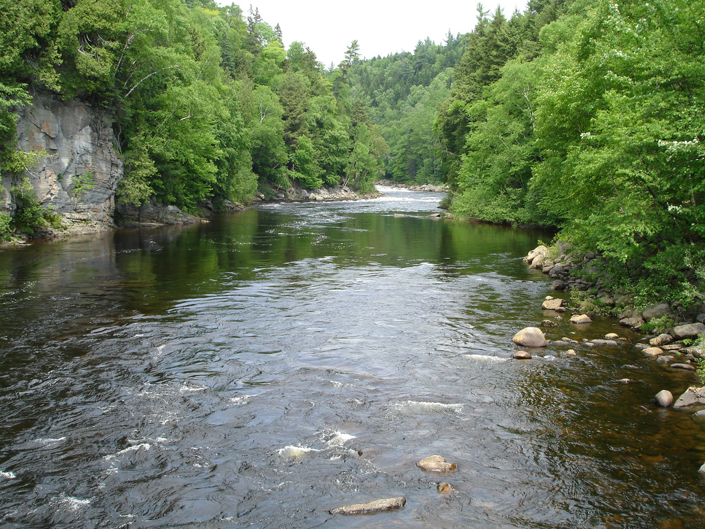 Sainte-Anne-du-Nord River in Quebec Province, Canada.